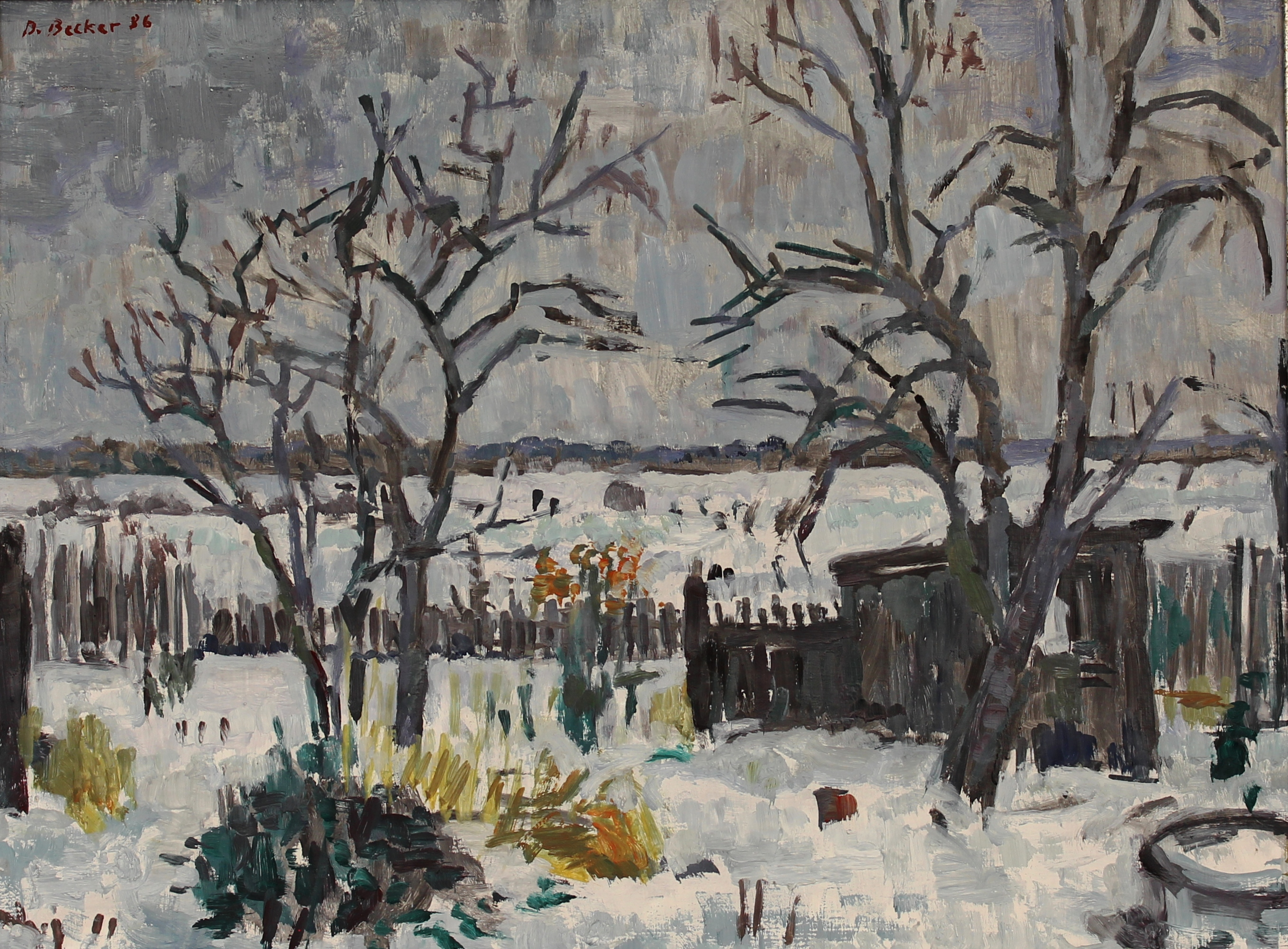 Landschaft Ostsee